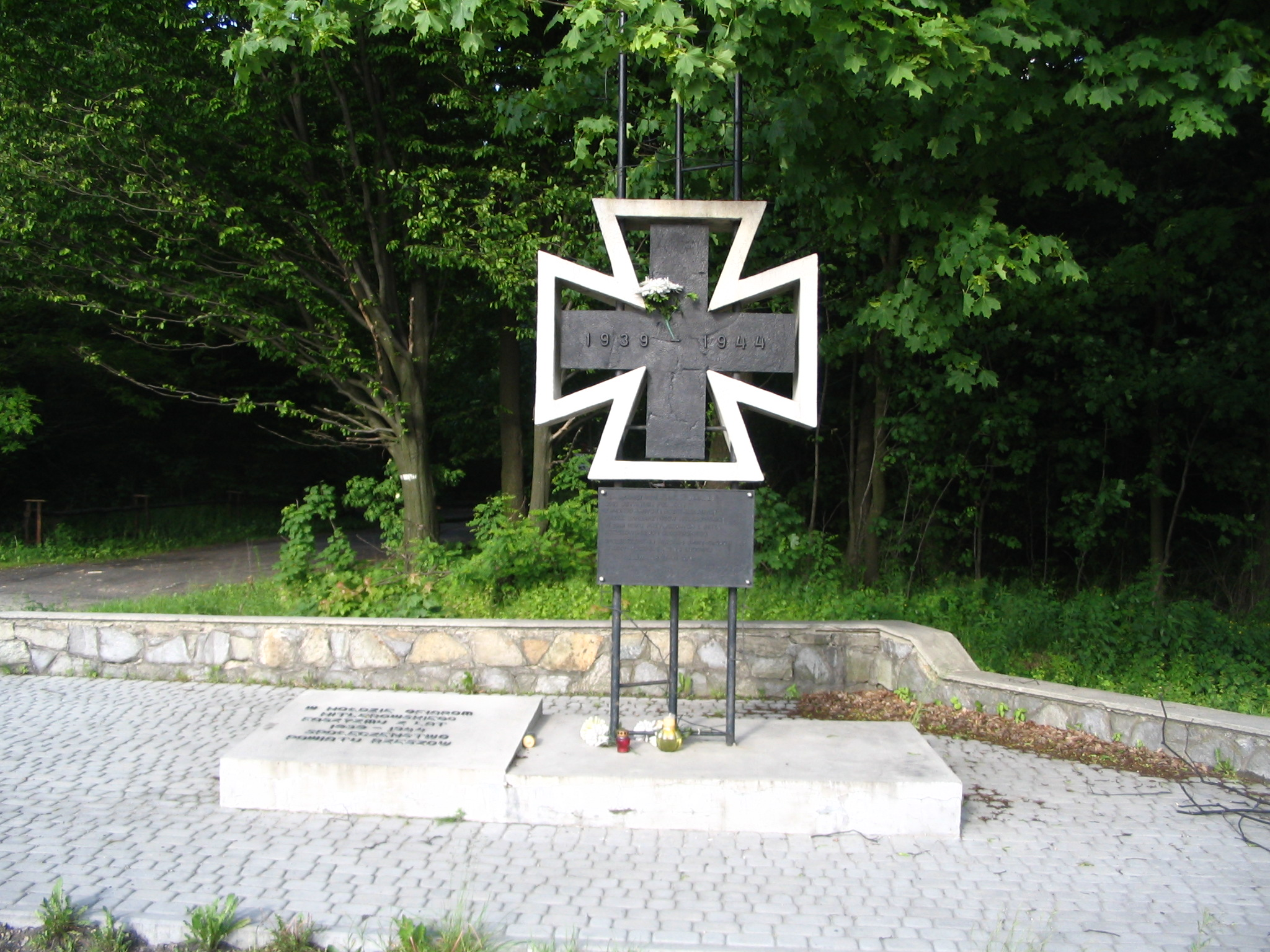 description en: A monument placed by the road from Rzeszów to Glogow Malopolski (small city in south-eastern Poland). It commemorates 2500 Jews and 300 AK soldiers killed by Nazis during World War II in the "Bór" forest. opis pl: Pomnik ustawiony przy drodze prowadzącej z Rzeszowa do Głogowa Małopolskiego. Upamiętnia 2500 Żydów i 300 żołnierzy AK zamordowanych przez hitlerowców. author/autor: Gardomir (polish wiki:[1]) source/źródło: a photograph taken by me (fotografia wykonana przeze mnie)